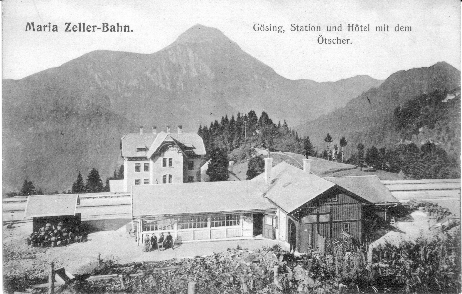 Ansichtskarte Bahnhof Gösing